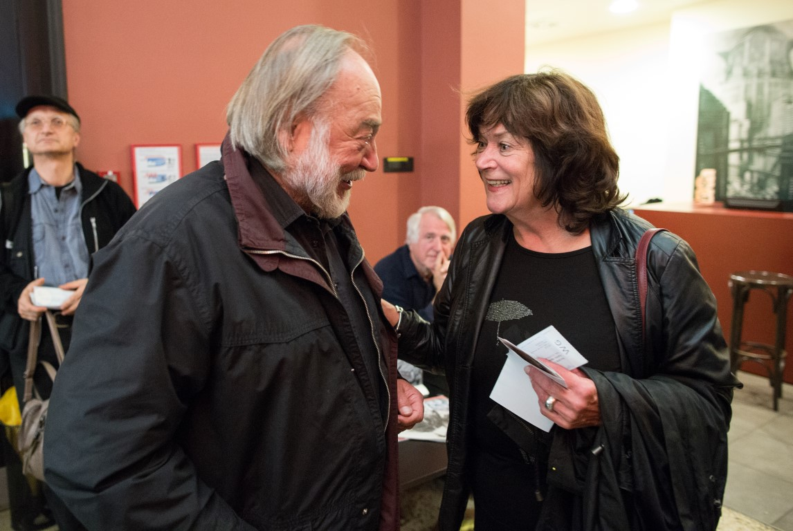 Podelitev nagrade Bert.